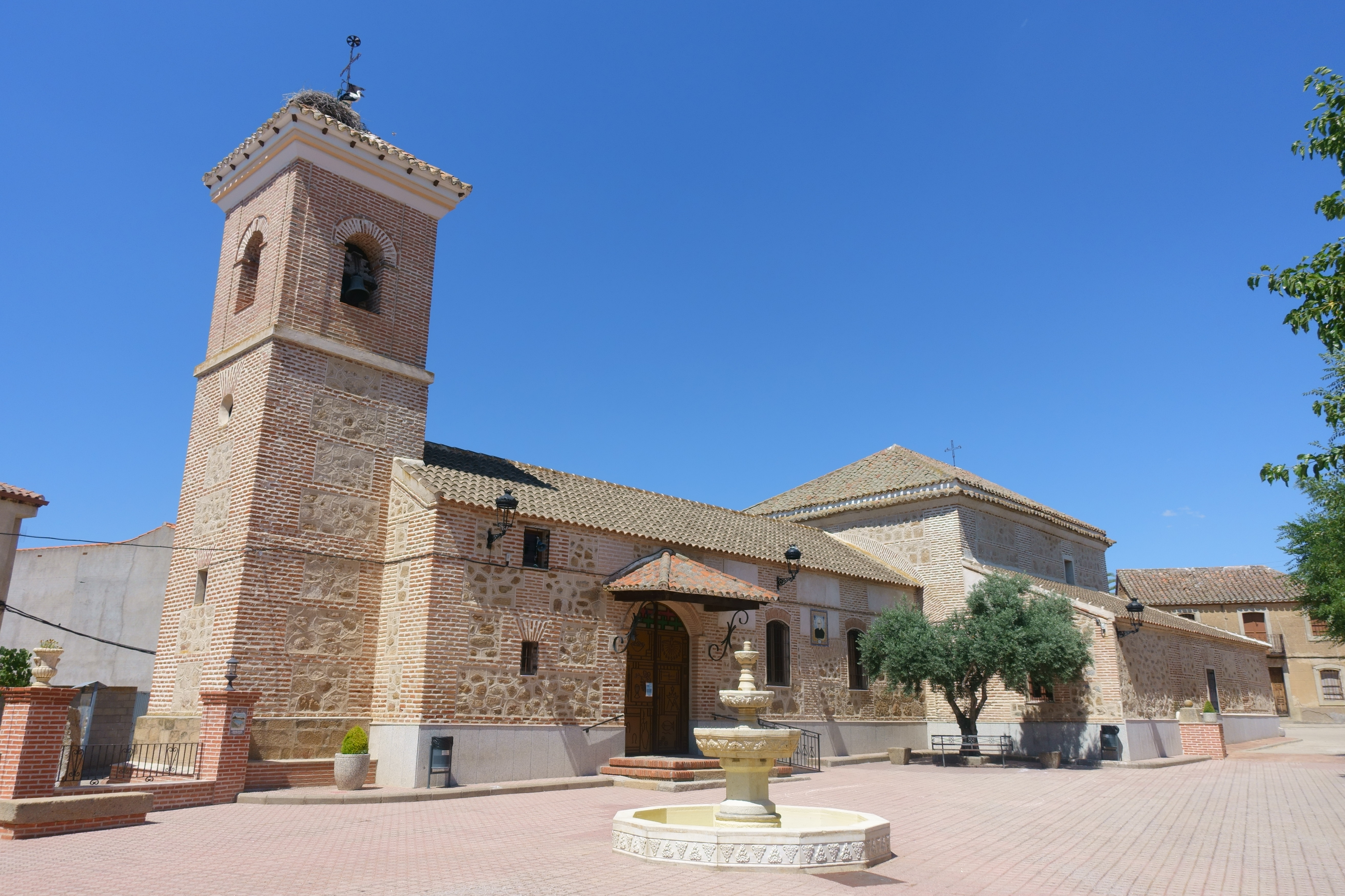 Iglesia de Santa Ana, Santa Ana de Pusa (Toledo, España).